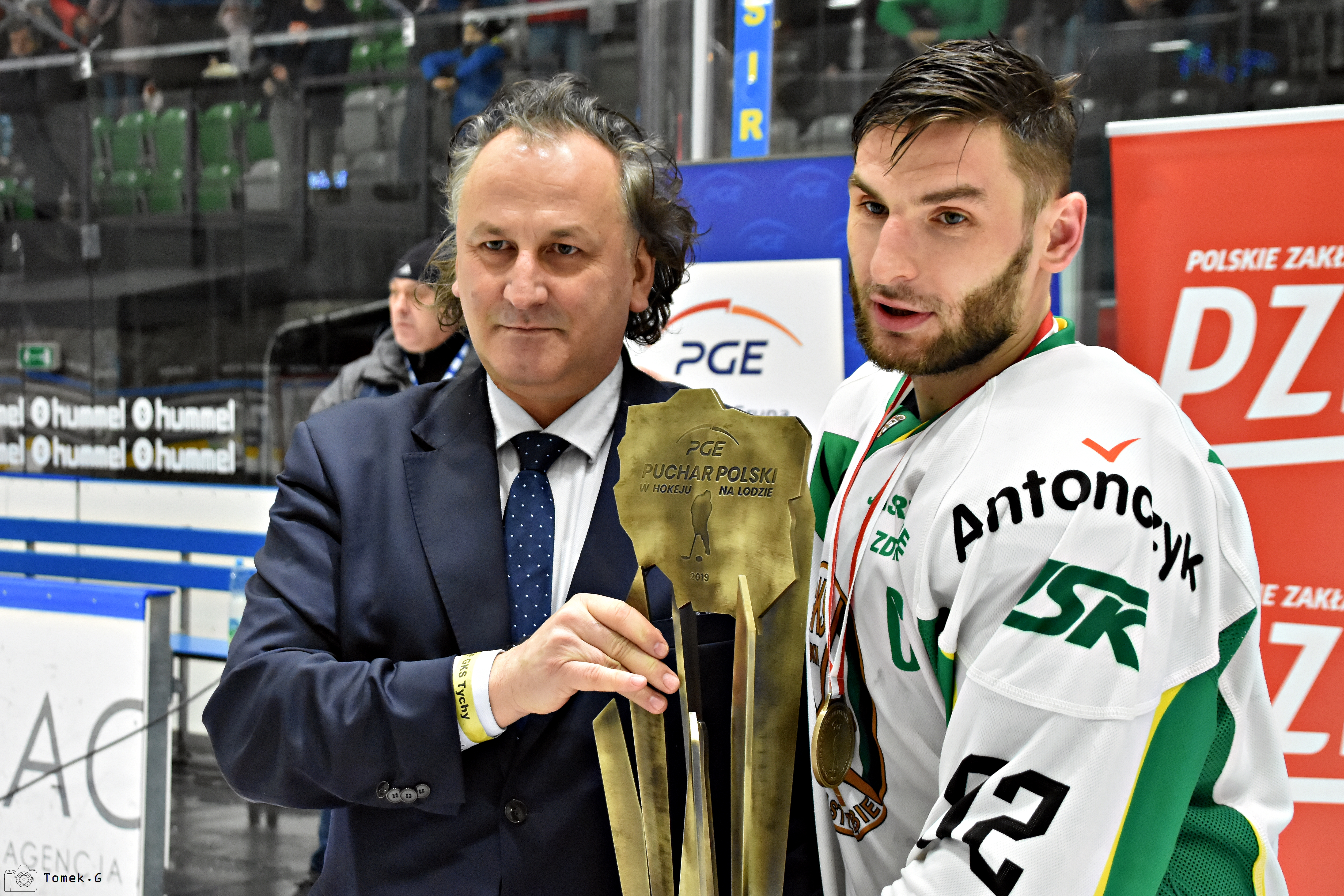 Finał Pucharu Polski w Hokeju na Lodzie 2019/2020